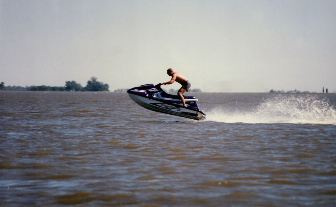 Autor: Germán Ramos. Cedida a dominio público.